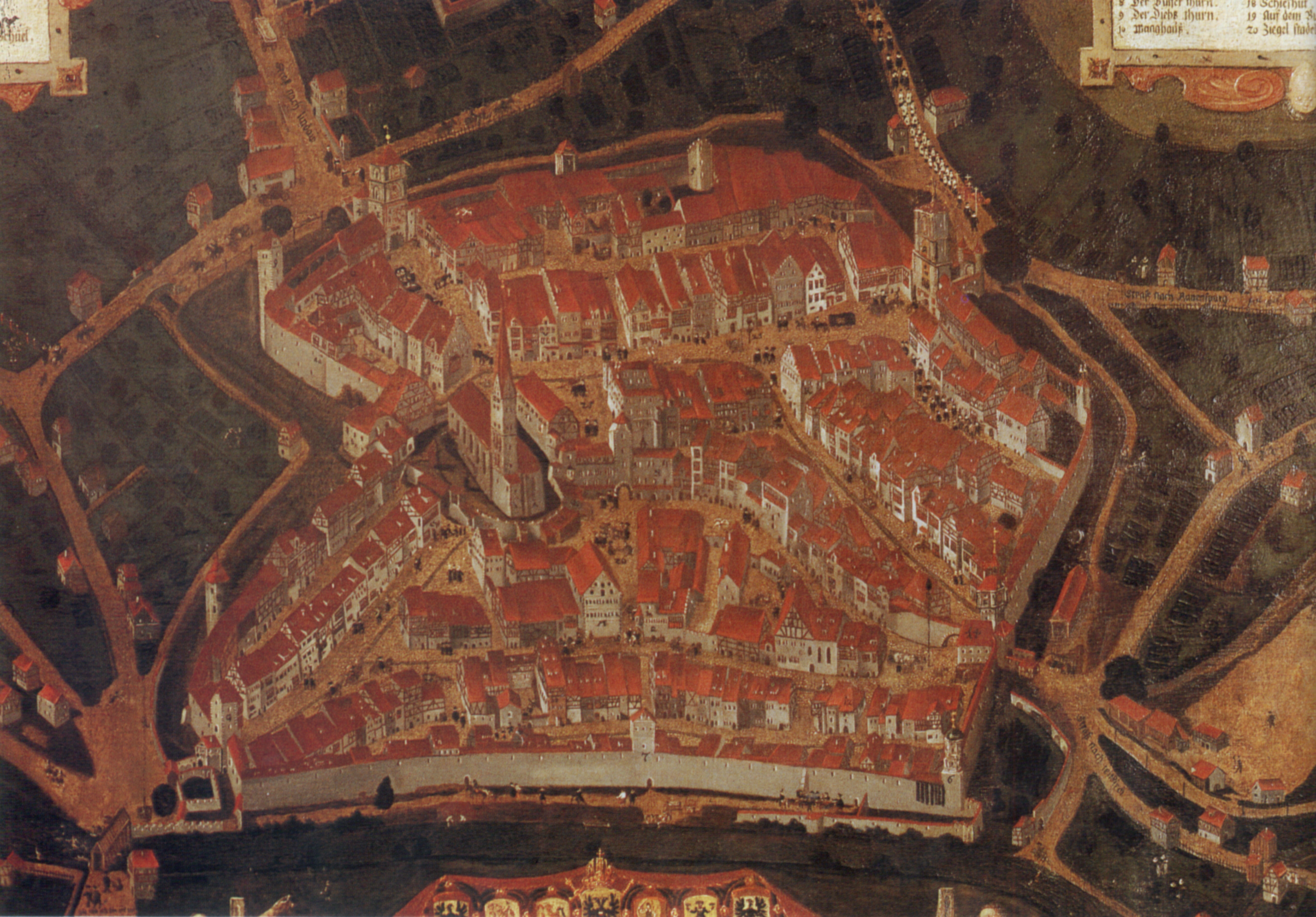 Ansicht der Stadt Wangen (Allgäu); Rathaus Wangen